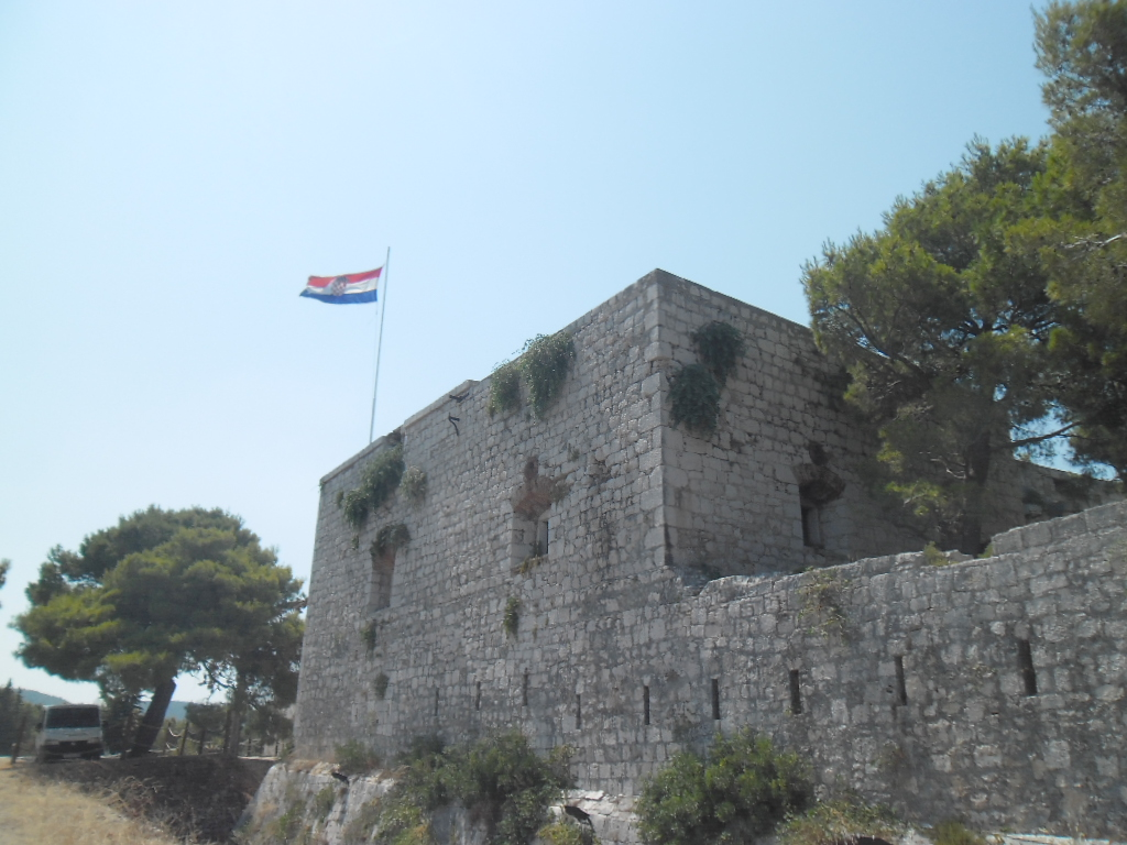 grad Vis